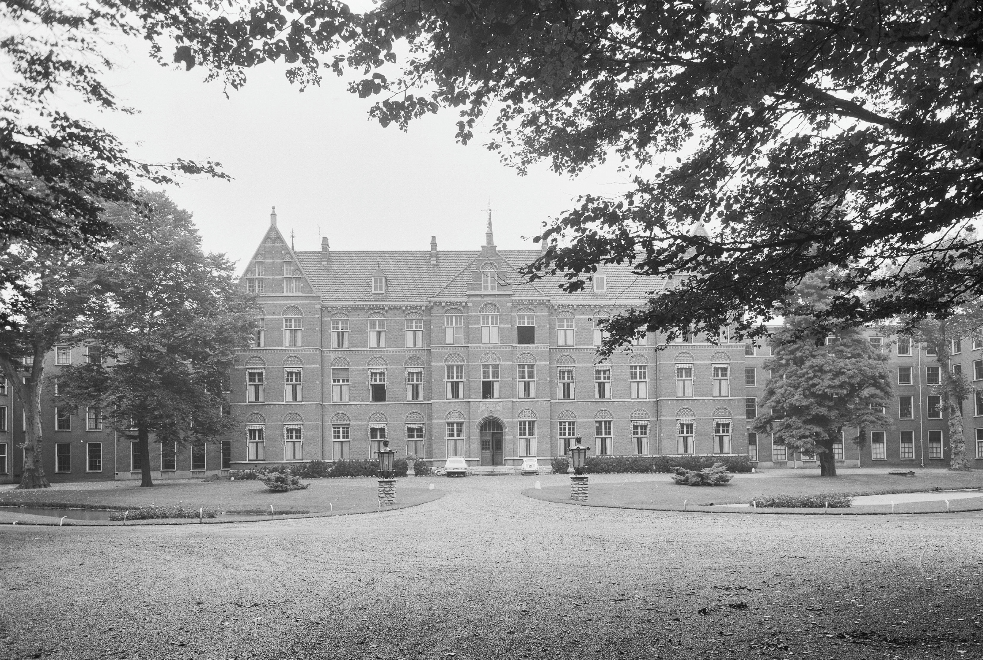 Groot Seminarie: voorgevel